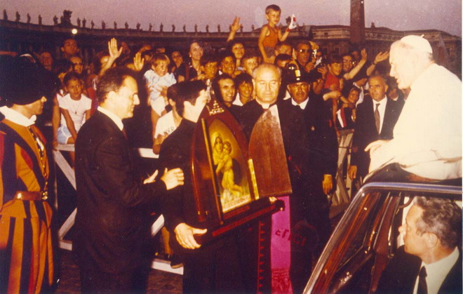 João Pozzobon em Roma